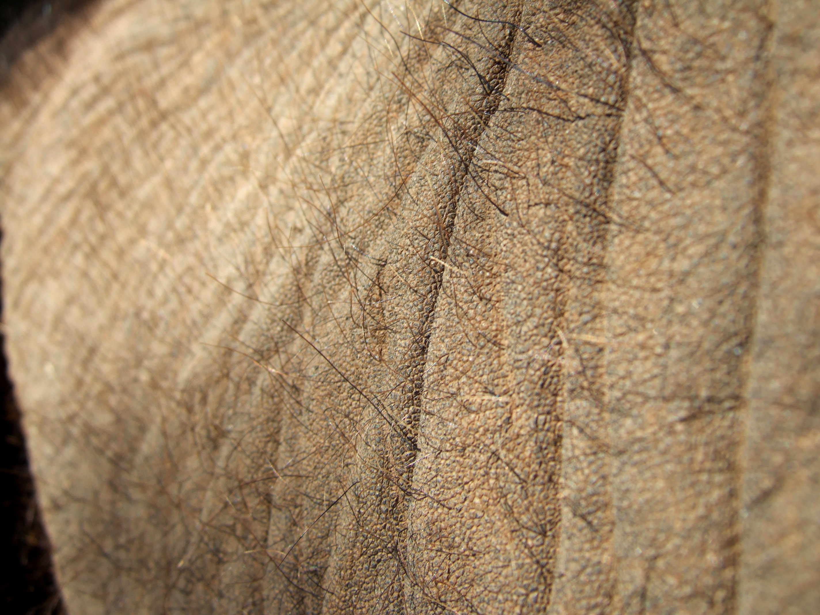 Elephant Skin